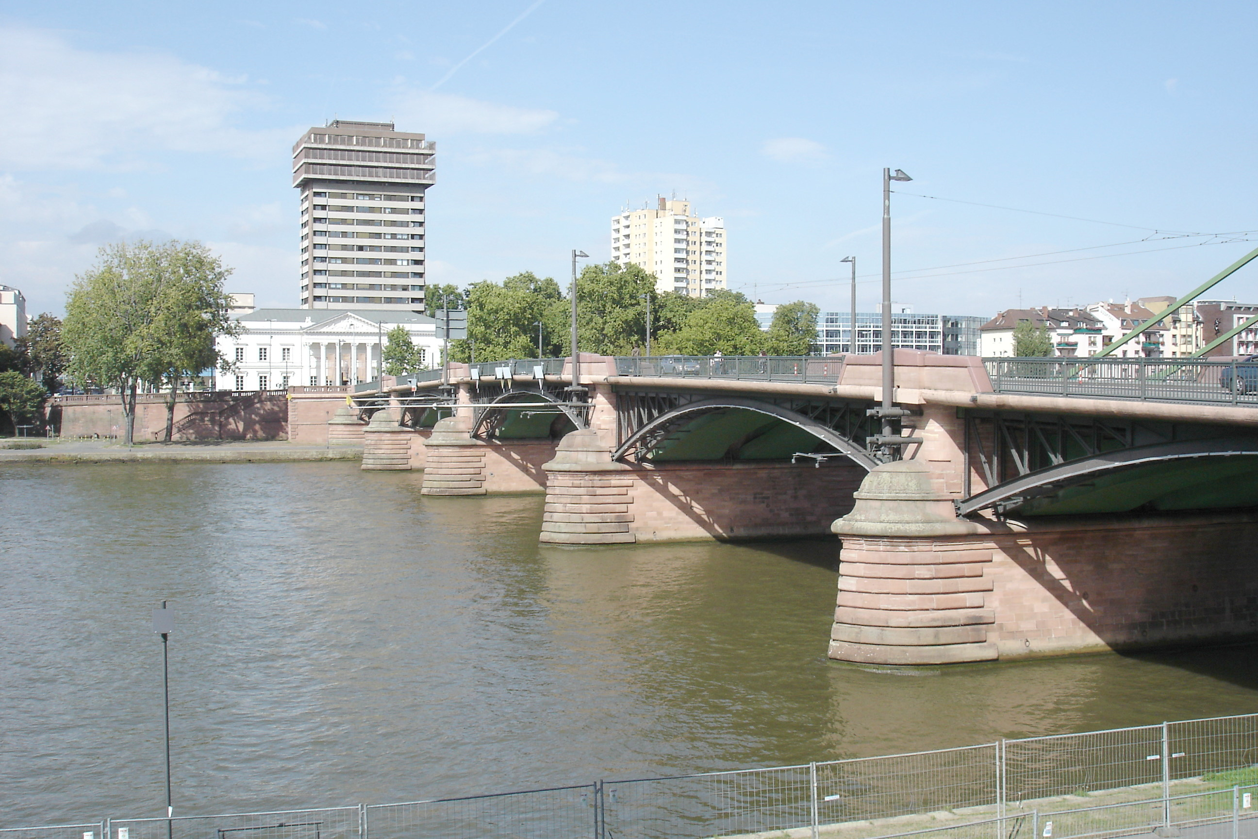 Ignatz-Bubis-Brücke mit "Alte Stadtbibliothek" vom Südufer gesehen, eigene Aufnahme, September 2006